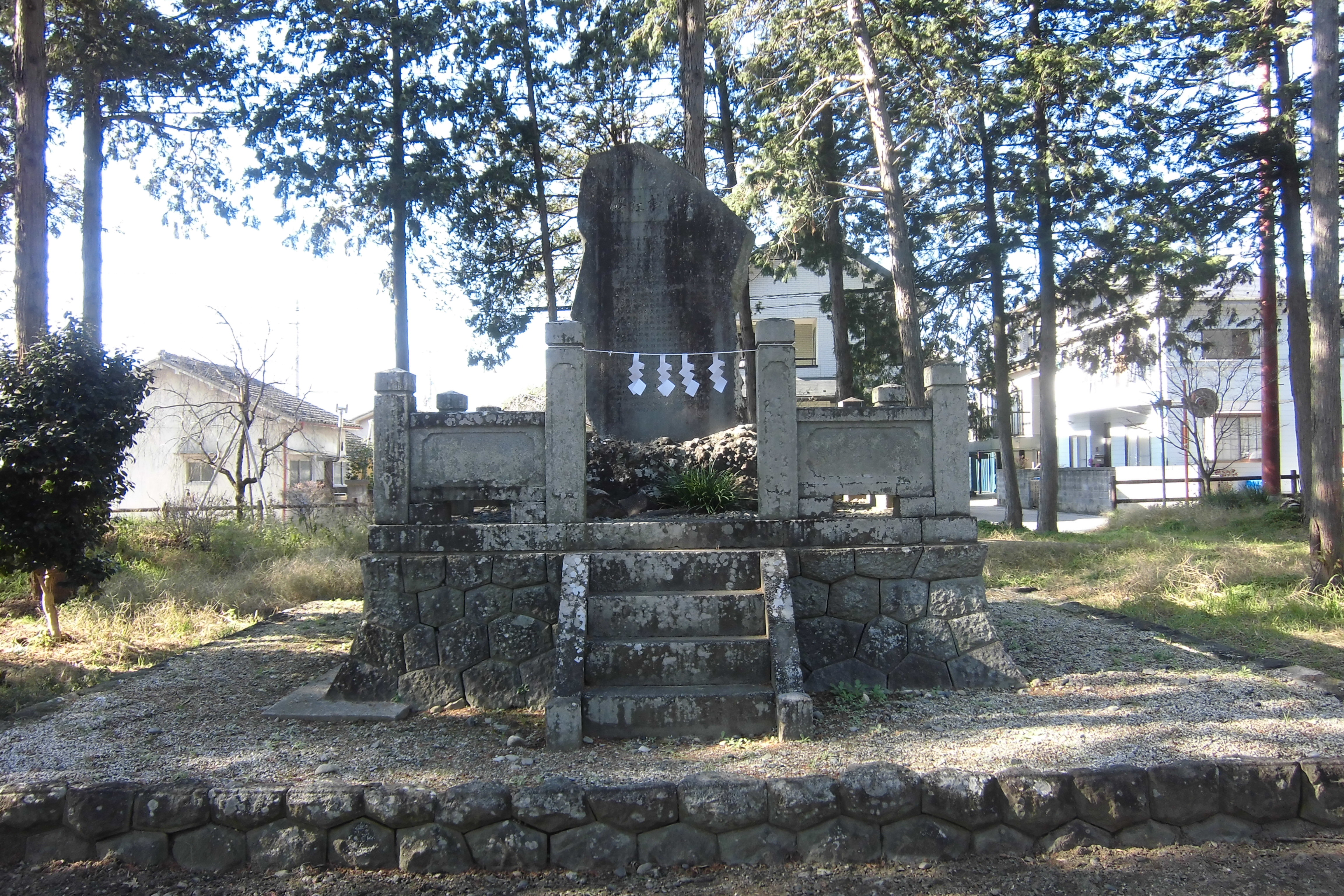 義清神社・石碑（山梨県昭和町西条）